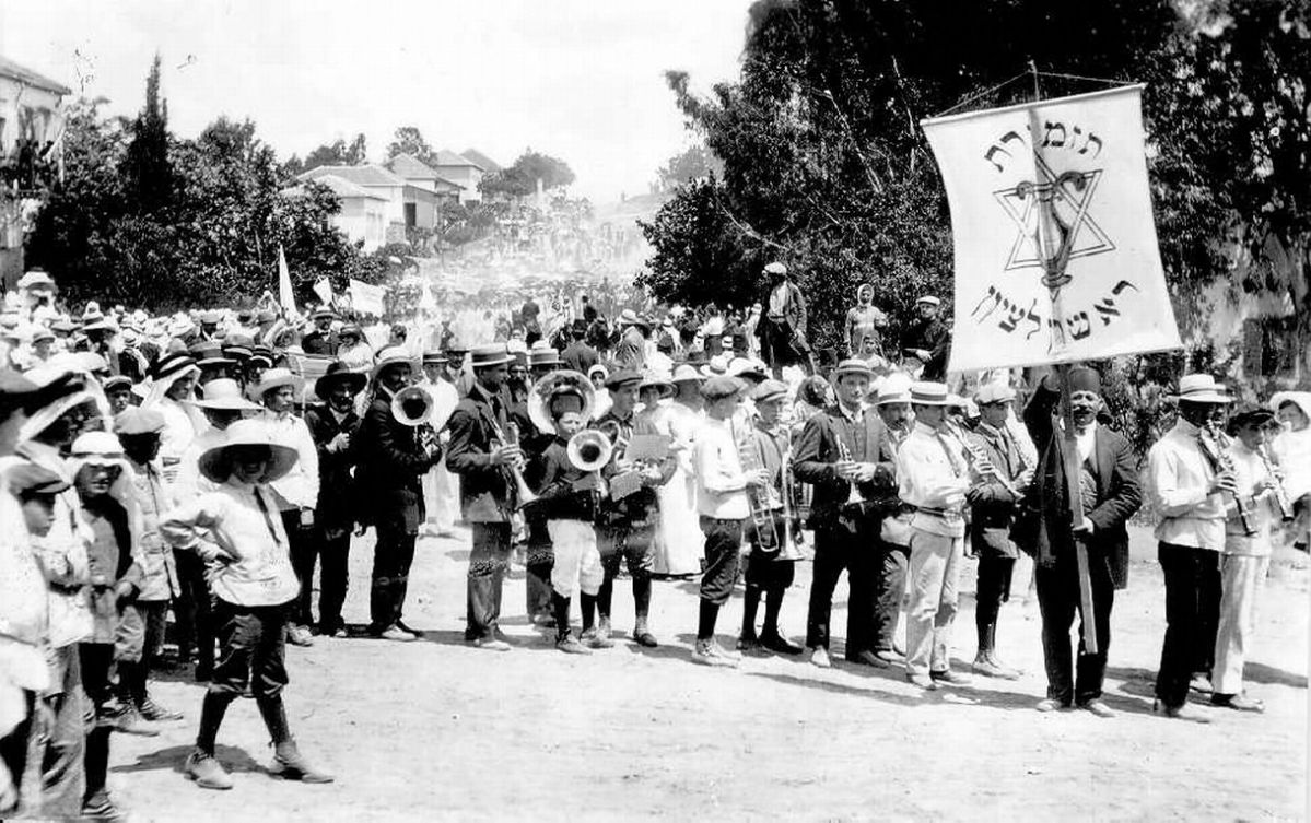 תזמורת ראשון לציון בהופעה ברחובות